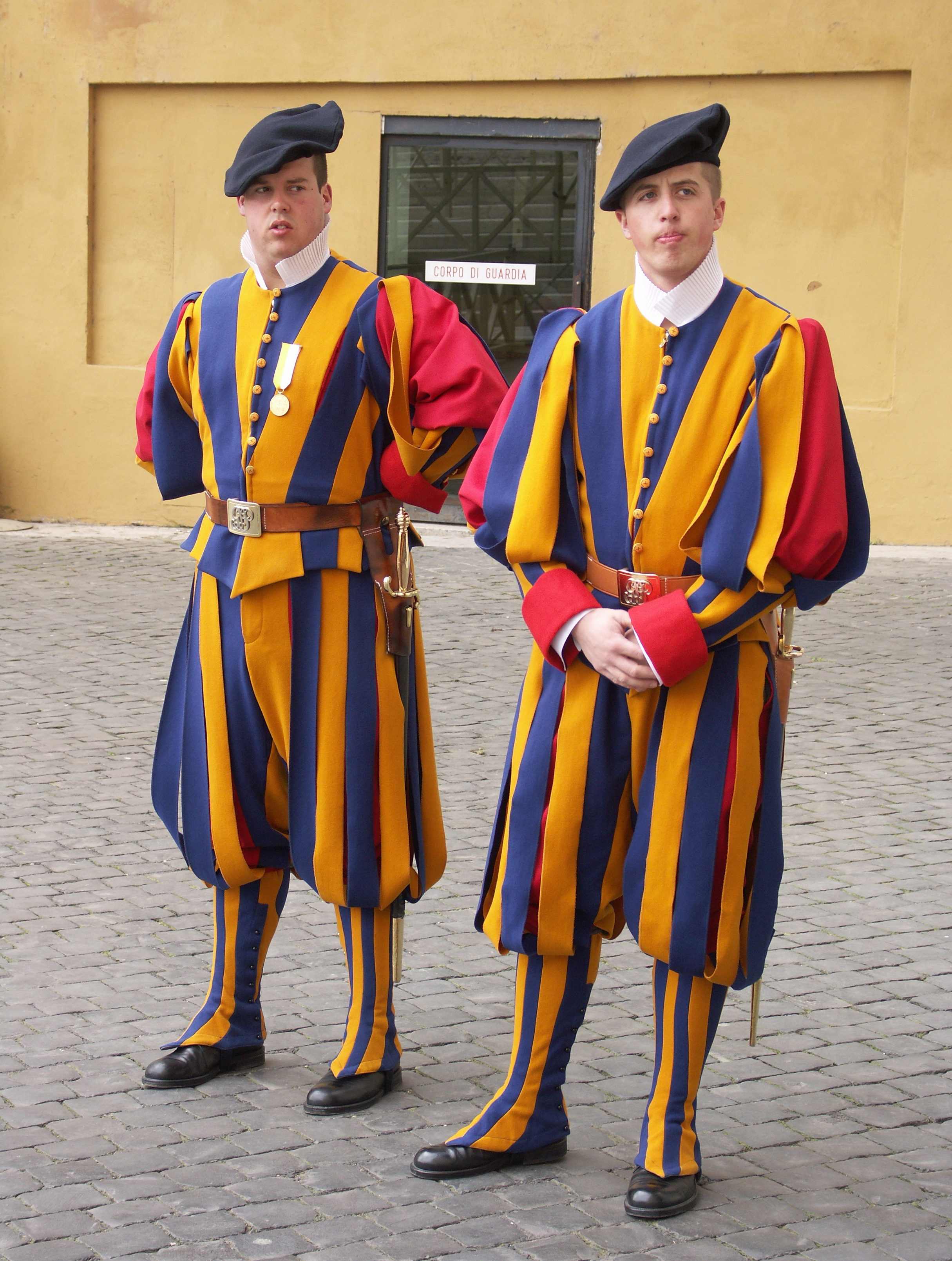 Rom, Vatikan, Soldaten der Schweizer Garde